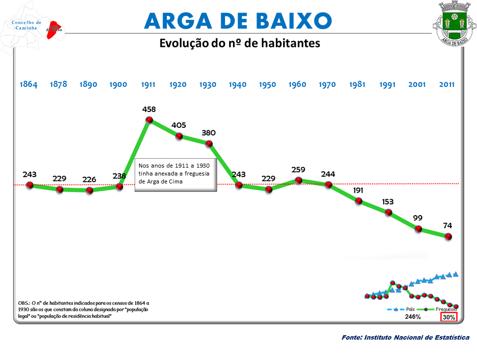 Censos 1864/2011